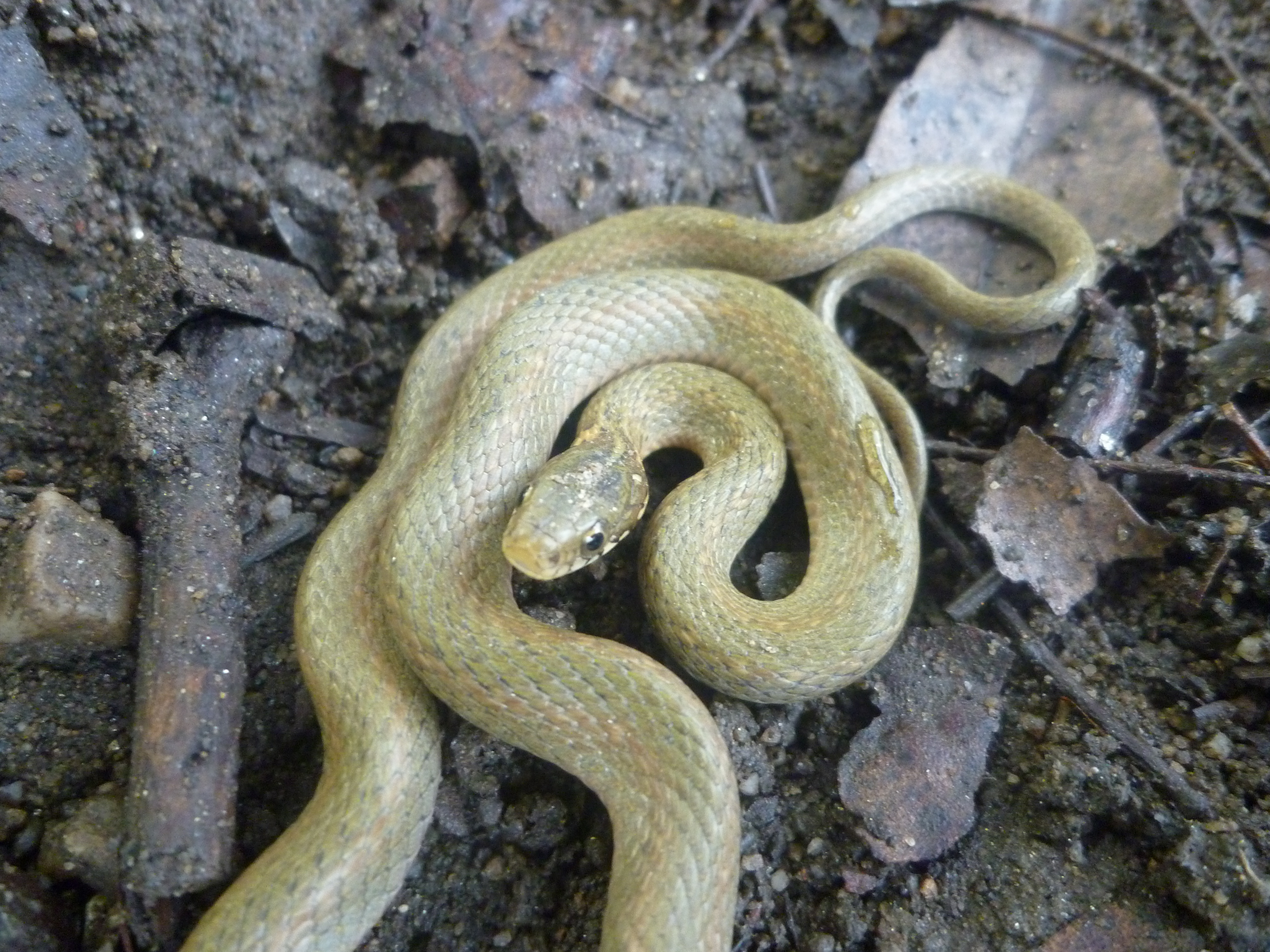 ナミヘビ科ヒヴァ属ヒバカリ（飼育しているもの）②